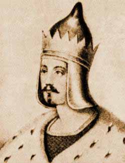 Изяслав Ярославич (1024—1078) — великий князь киевский в 1054—1068, 1069—1073 и с 1077, новгородский князь 1052—1054.